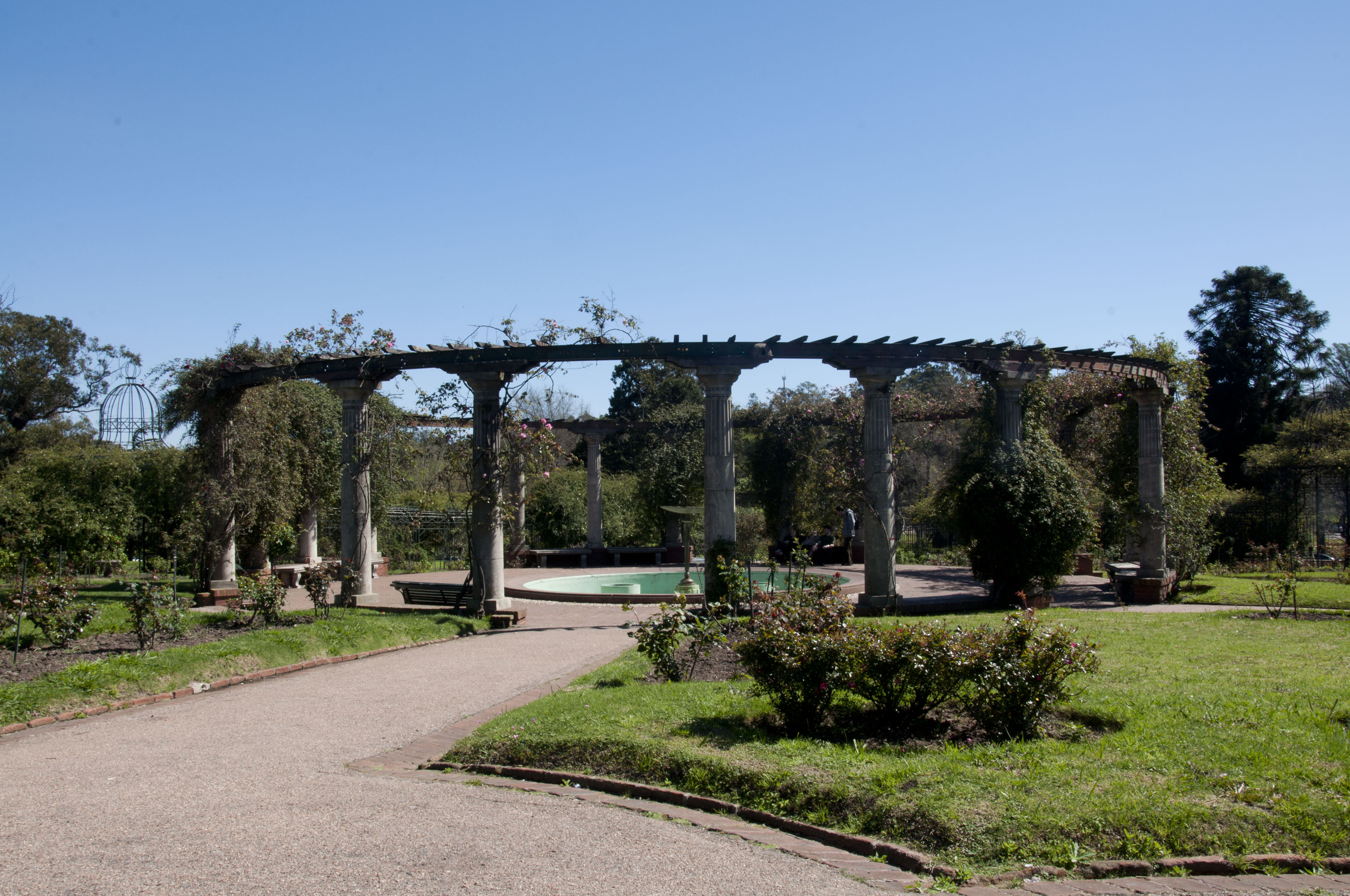 Parque El Prado. Ubicada en el departamento de Montevideo